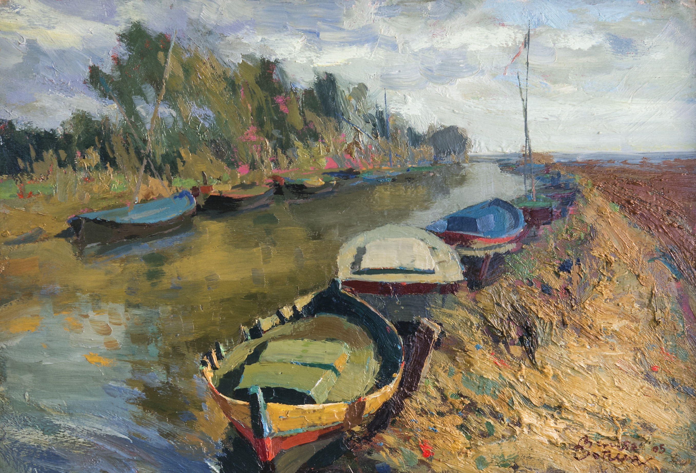 Projecte de col·laboració de l'Arxiu Ismael Latorre Mendoza amb Wikimedia Commons. Concessió de drets de publicació a Wikimedia Commons de l'autor Vicent Benito Botella, amb una llicència Creative Commons-BY-SA 3.0, de les imatges de la seua obra pictòrica, el seu taller de treball i la seua pròpia imatge a Carolina Latorre Canet i a l'Arxiu Ismael Latorre Mendoza. Data: 05-11-2017. Obra: Autor: Vicent Benito Botella. Títol: El port de Silla. Tècnica: Pintura a l'oli damunt taula de fusta. Mida: 27x41cm. Lloc: Silla. Data: 2005.